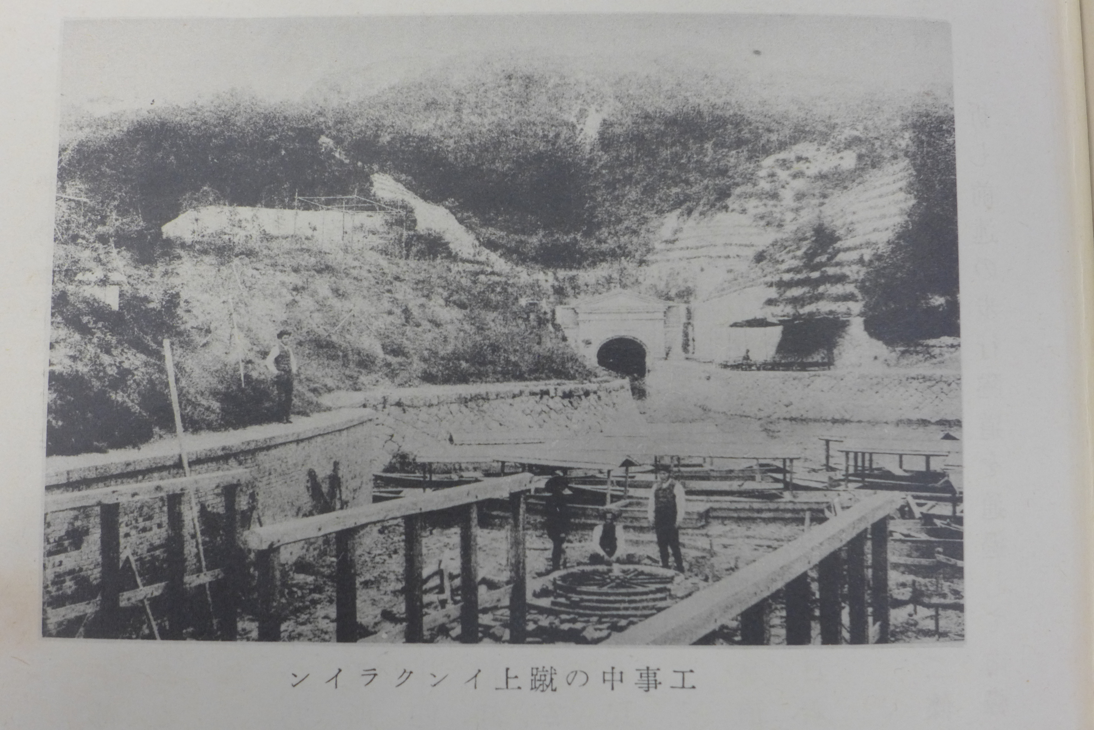 工事中の蹴上インクライン